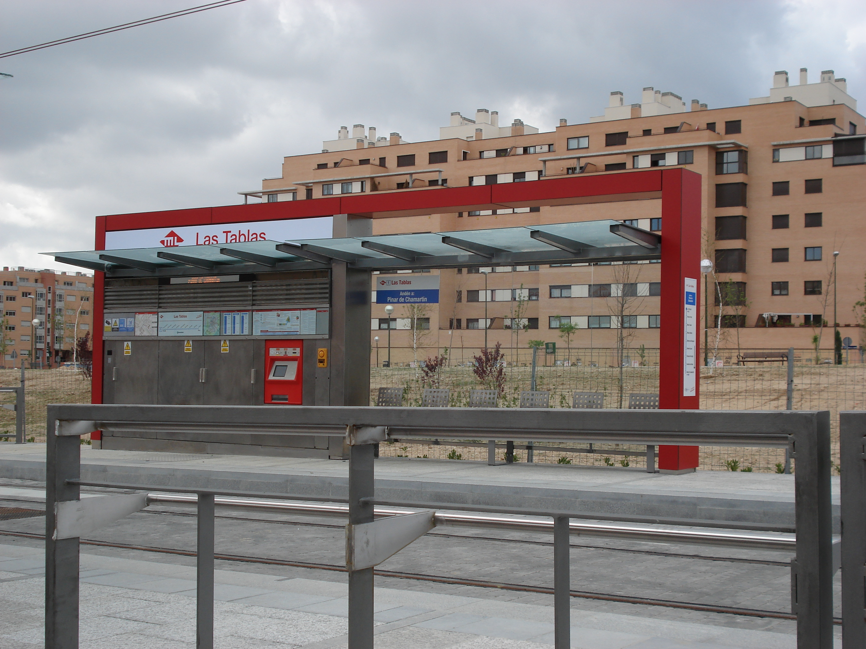 Estacion de Metro Ligero de las Tablas